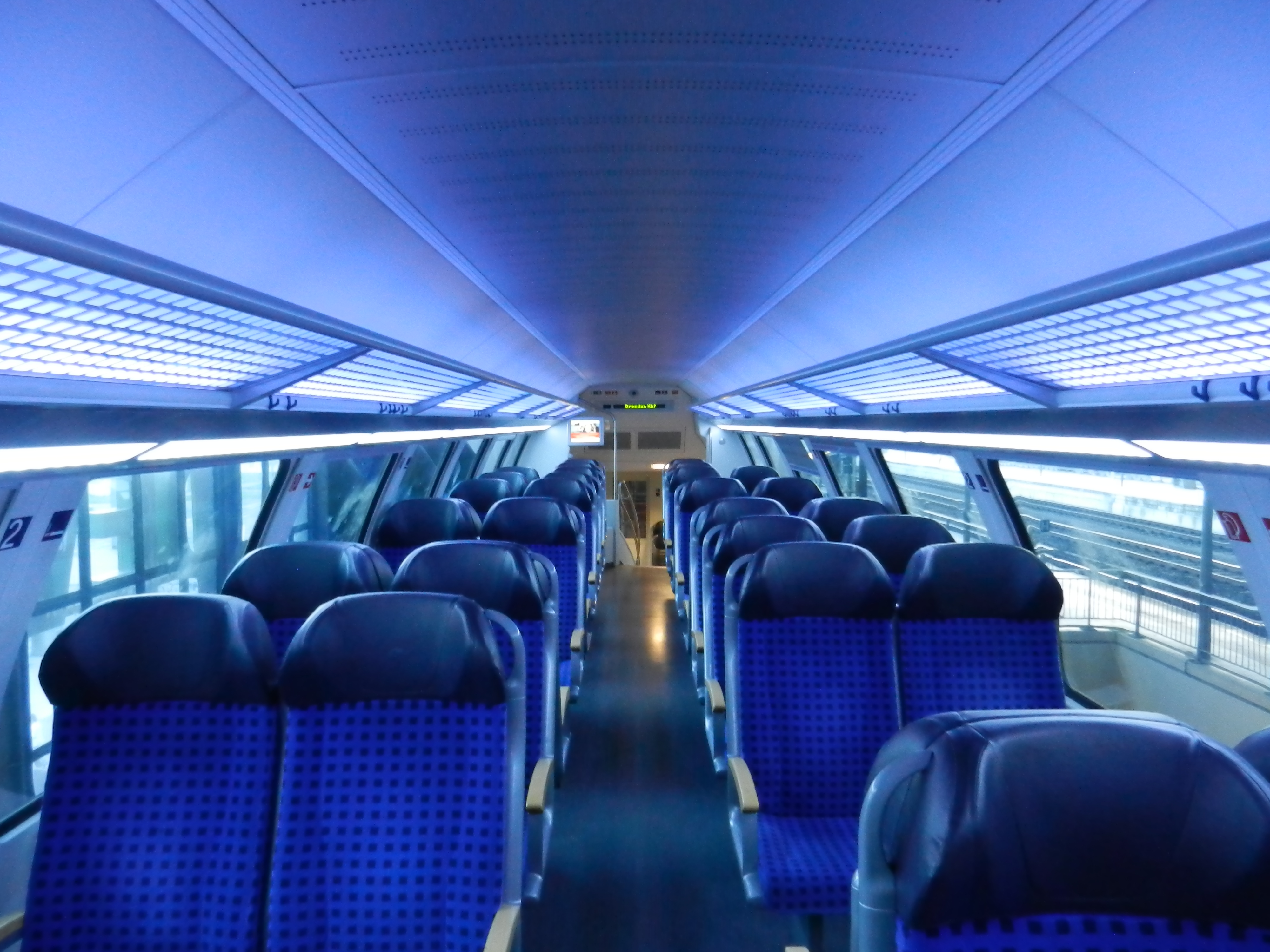 Die Inneneinrichtung des Oberdecks eines neuen Dosto-Wagens der S-Bahn Dresden aufgenommen aus der Mitte des Wagens in Dresden Hbf